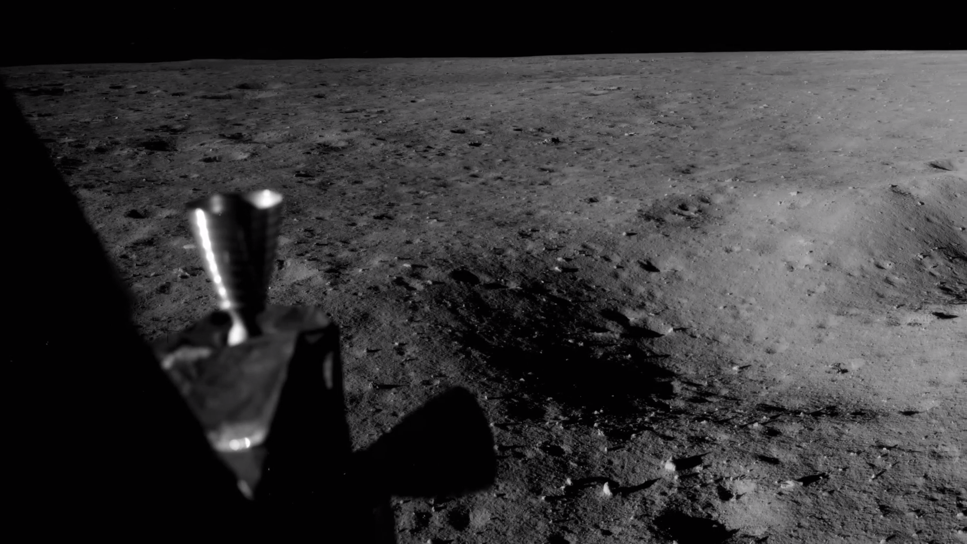 מנוע מהחללית עיט של אפולו